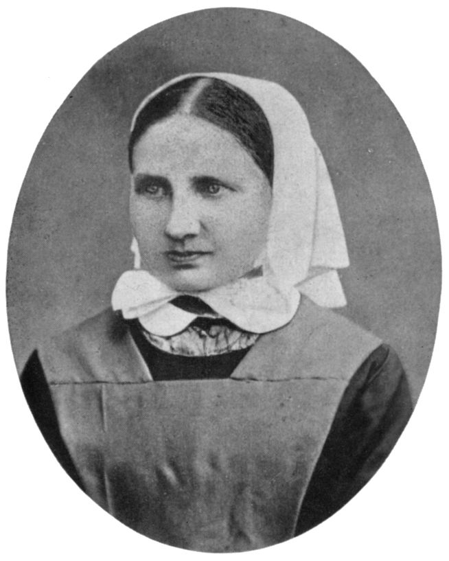 Therese Stählin als Lehrerin der Blauen Schule. Foto laut Meine Seele erhebet den Herrn, S. 143 1864 gemacht.